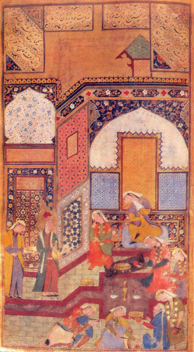 ЮСУФ ПЕРЕД ЖЕНЩИНАМИ ЕГИПТА, Джами. «Юсуф и Зулейха». Частное собрание. США. 1550-е гг. Бухара